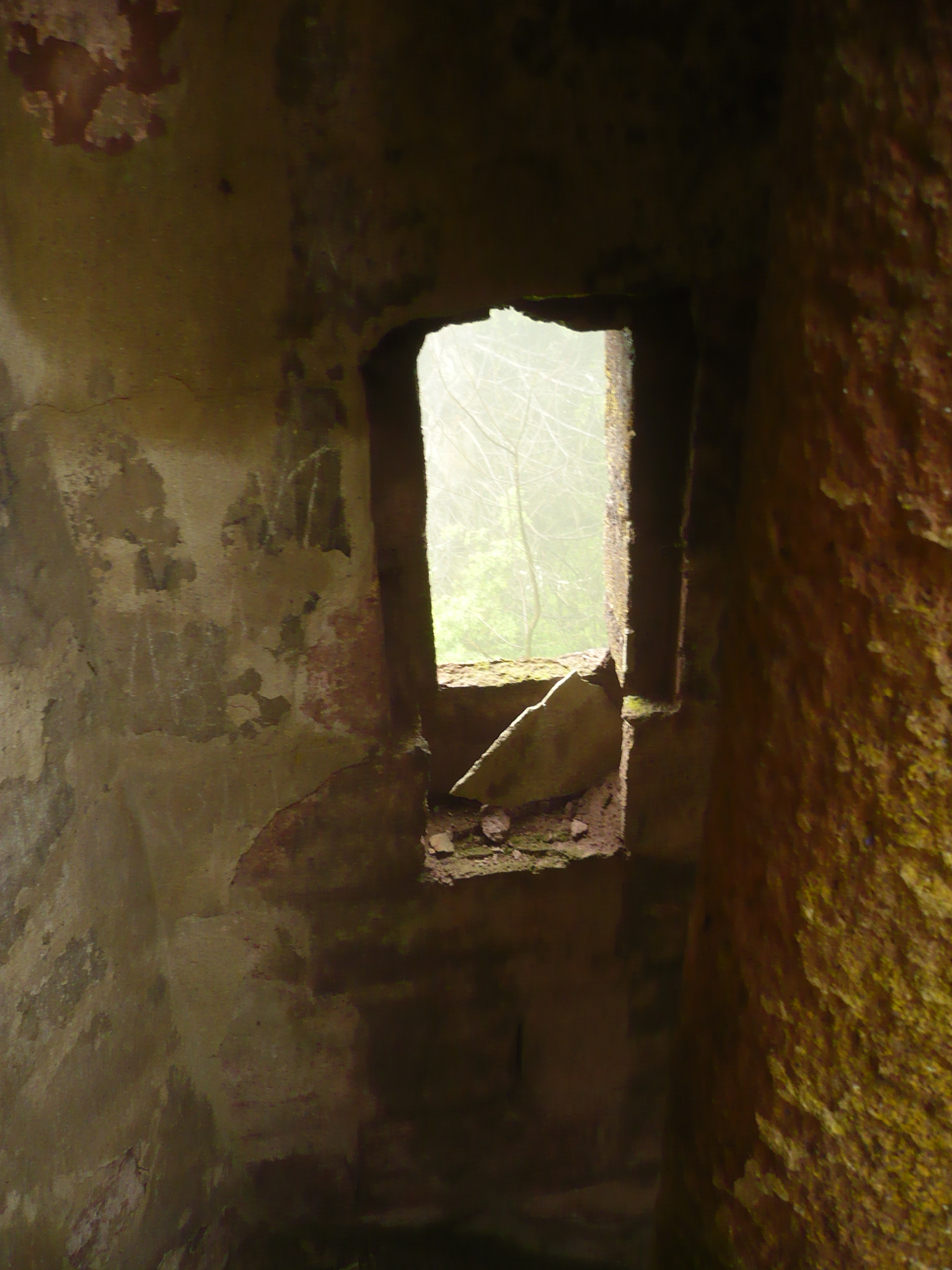 Włodzicka Góra. Wieża